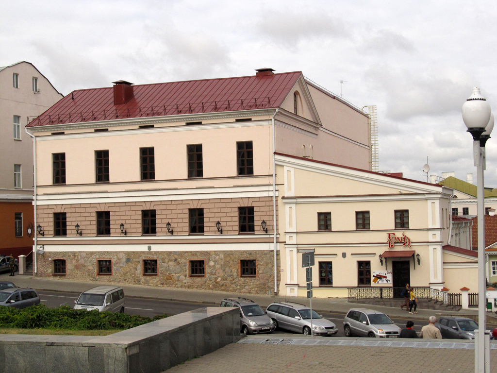 Мінск. Вуліца Інтэрнацыянальная, 33, 31